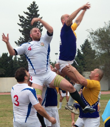 эпизод матча Азербайджан - Босния